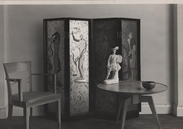 Paravent des quatre éléments (l'eau, l'air, la terre, le feu), en glaces gravées de Pierre Lardin et mobilier avec objets d'art.